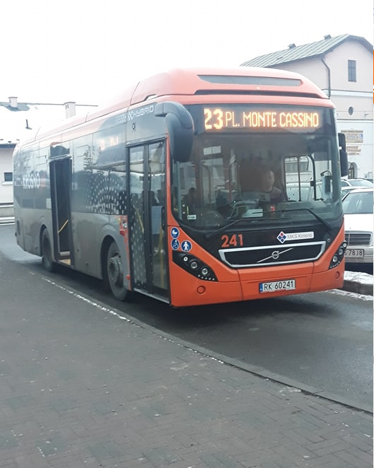 Autobus Volvo 7900 Hybrid w barwach MKS Krosno podczas obsługi linii "23"